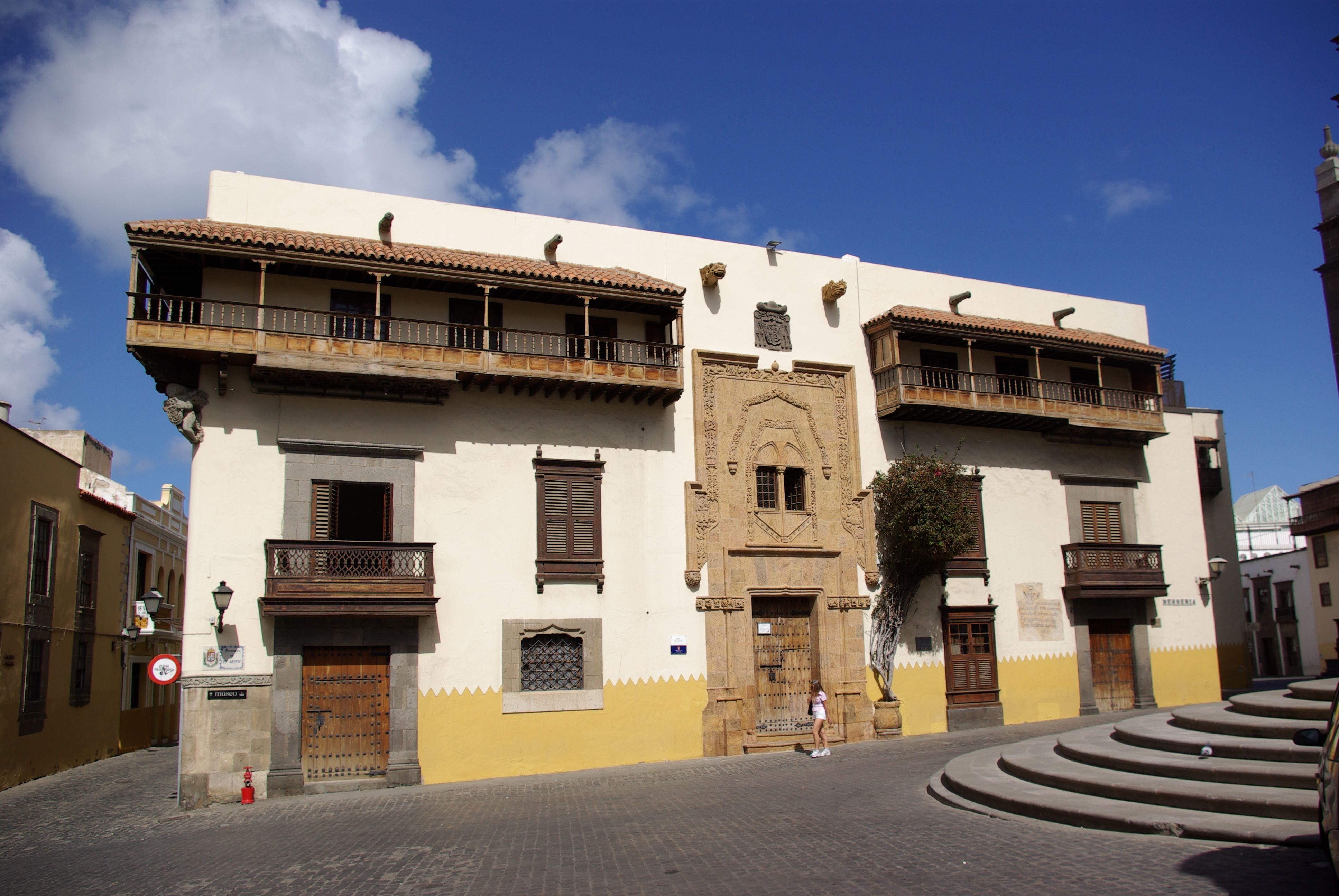 Las Palmas de Gran Canaria, das Cas de Colon oder Kolumbushaus (Geotag in den EXIF Daten)